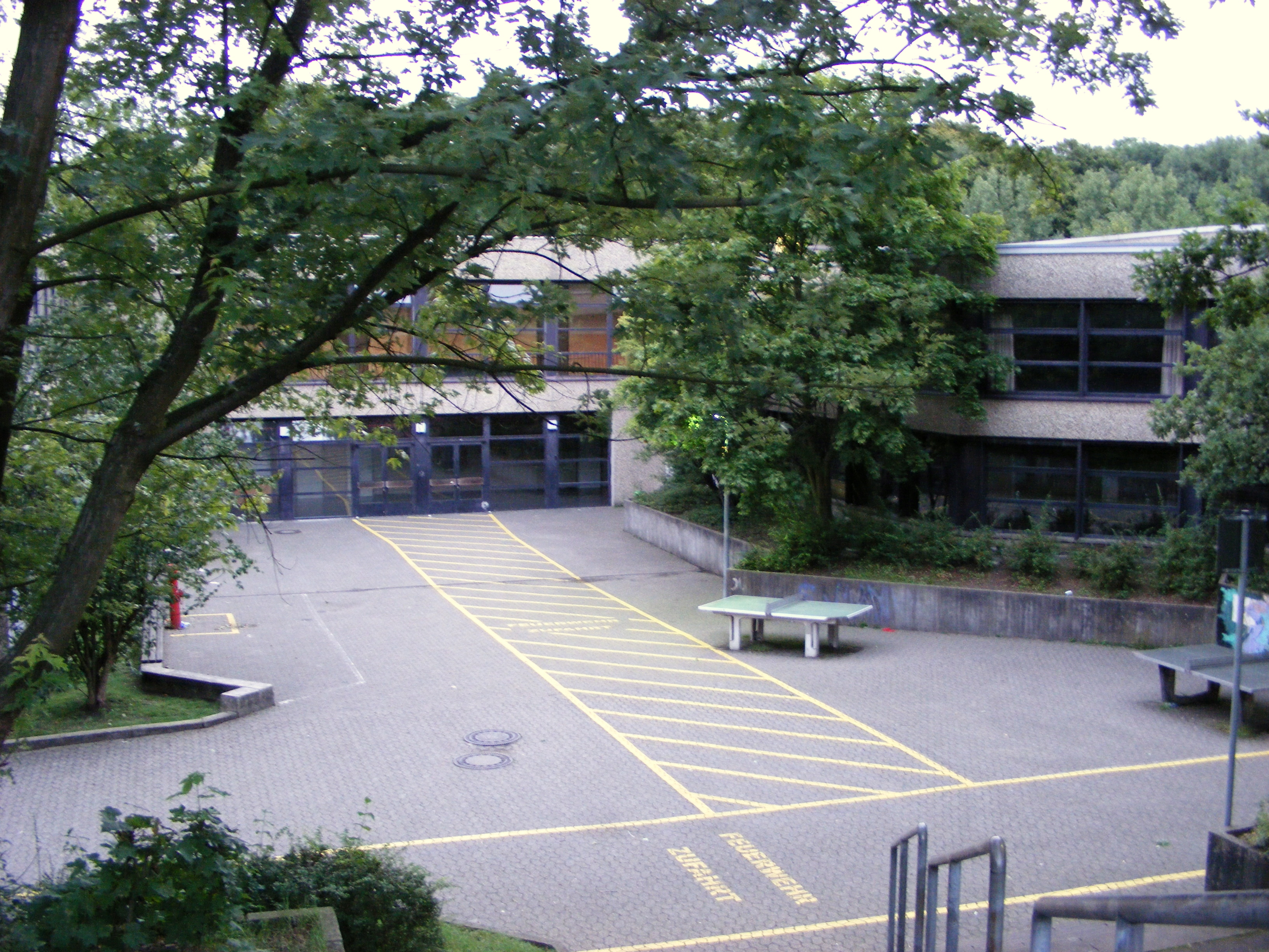 Aula des städtischen Gymnasiums Haan